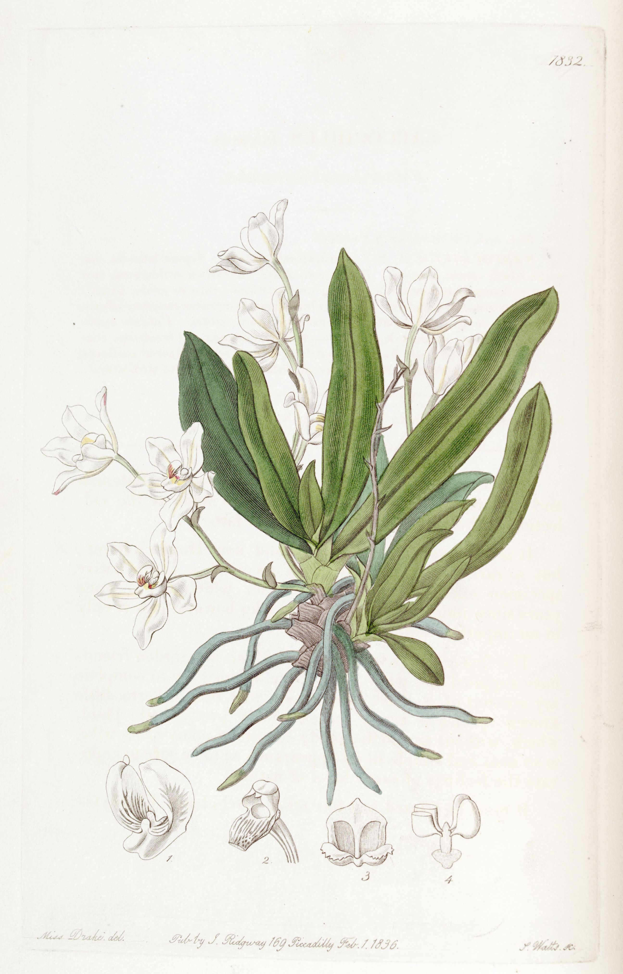 Sarcochilus falcatus